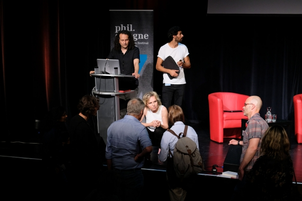 Sabine Döring 2019 im intensiven Gespräch mit Teilnehmenden nach ihrem Vortrag "Emotion und Argument" auf der Fachtagung "Streiten lernen" der Bundeszentrale für politische Bildung